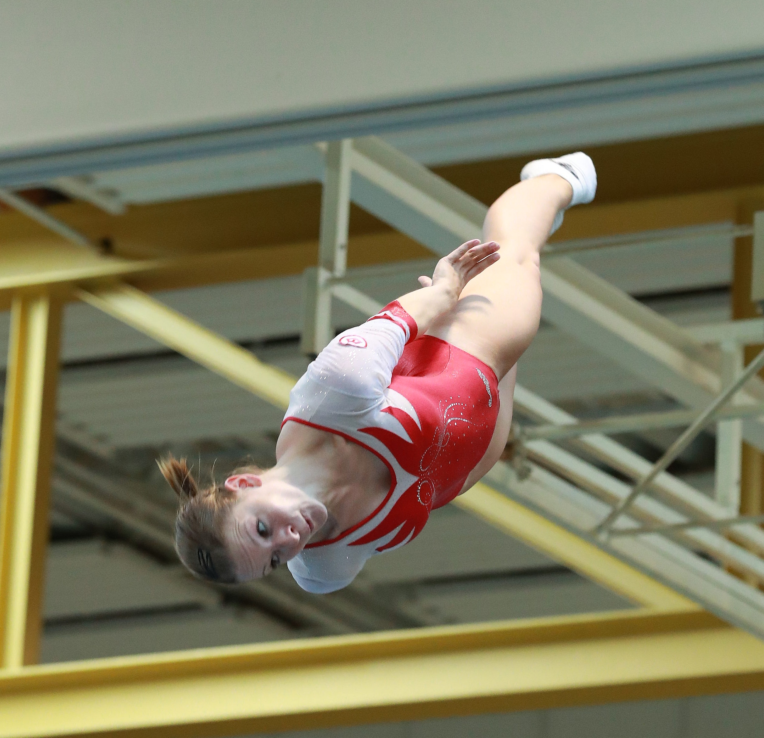 Wettkampf 9 Elite weiblich Erwachsene 2001 und älter Finale beim 9. Internationalen Filder Pokal im Trampolinturnen 2018 in Ruit. Abgebildet: Leonie Adam.